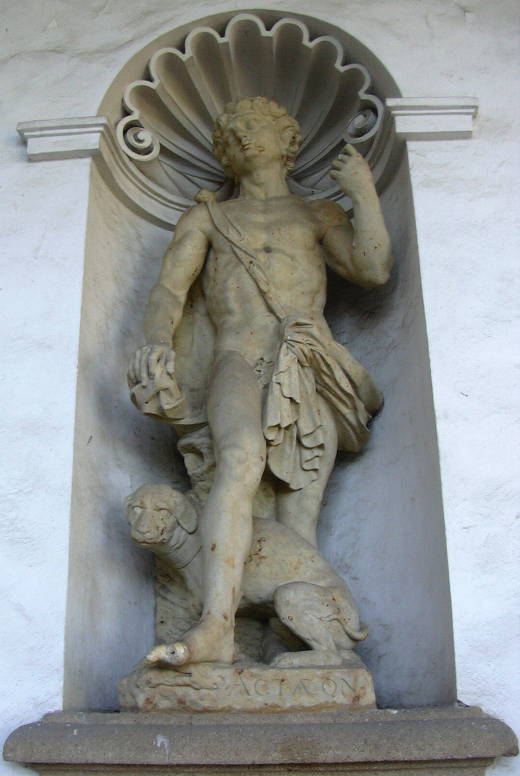 Actaeon - socha Kroměříž Květná zahrada